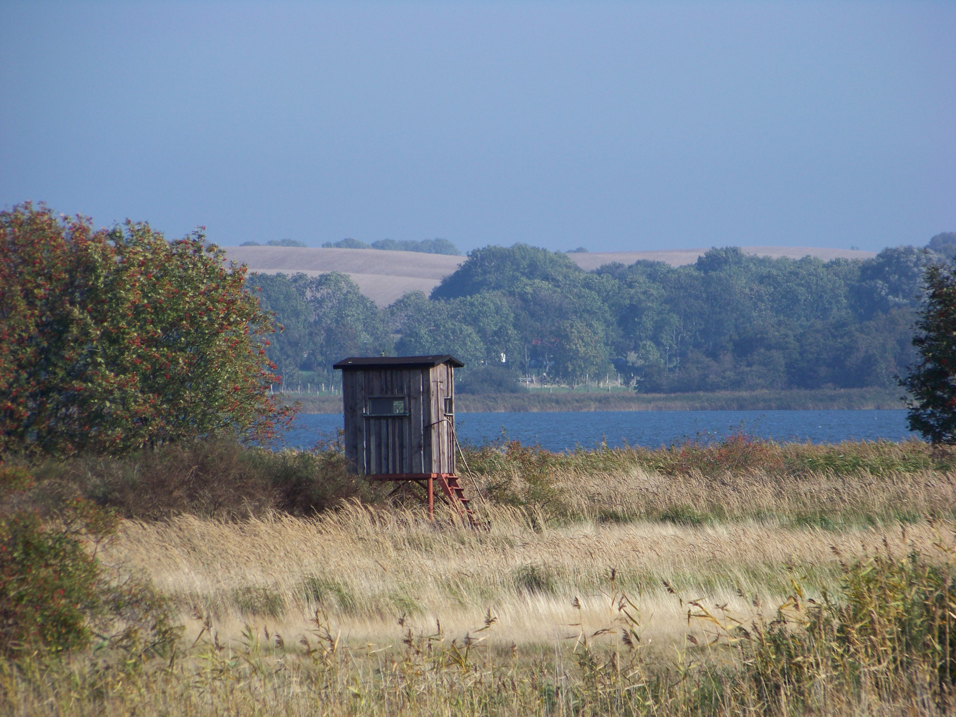 Spyker bezeichnet einen Ortsteil der Gemeinde Glowe auf der Ostseeinsel Rügen.